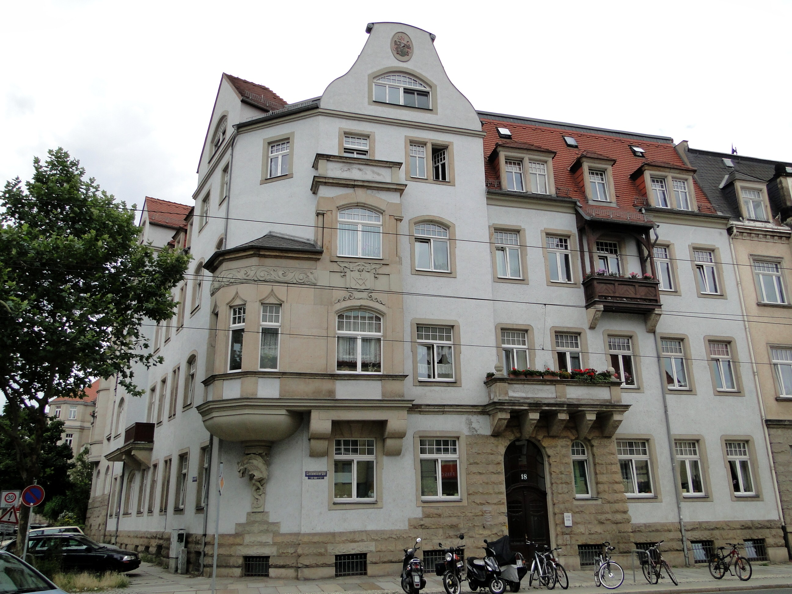 Haus Lockwitzer Straße 18 in Dresden